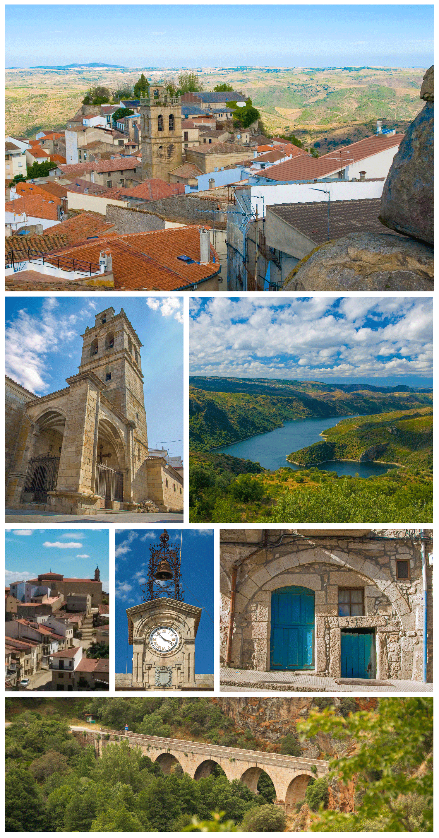 Imágenes representativas de la localidad de Fermoselle, en los arribes del Duero.